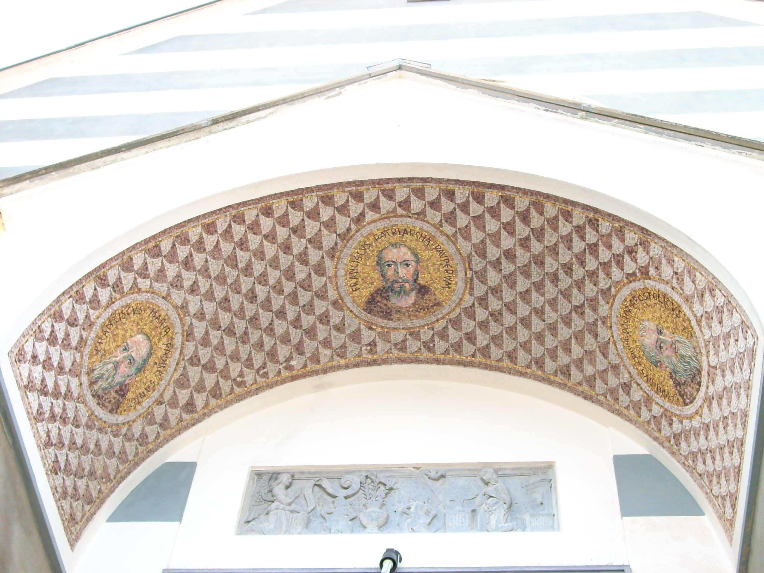 Santa Margherita Ligure, Liguria, Italia